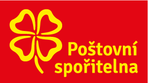 Základní logo Poštovní spořitelny - žlutý čtyřlístek s textem „Poštovní spořitelna“ na červeném pozadí